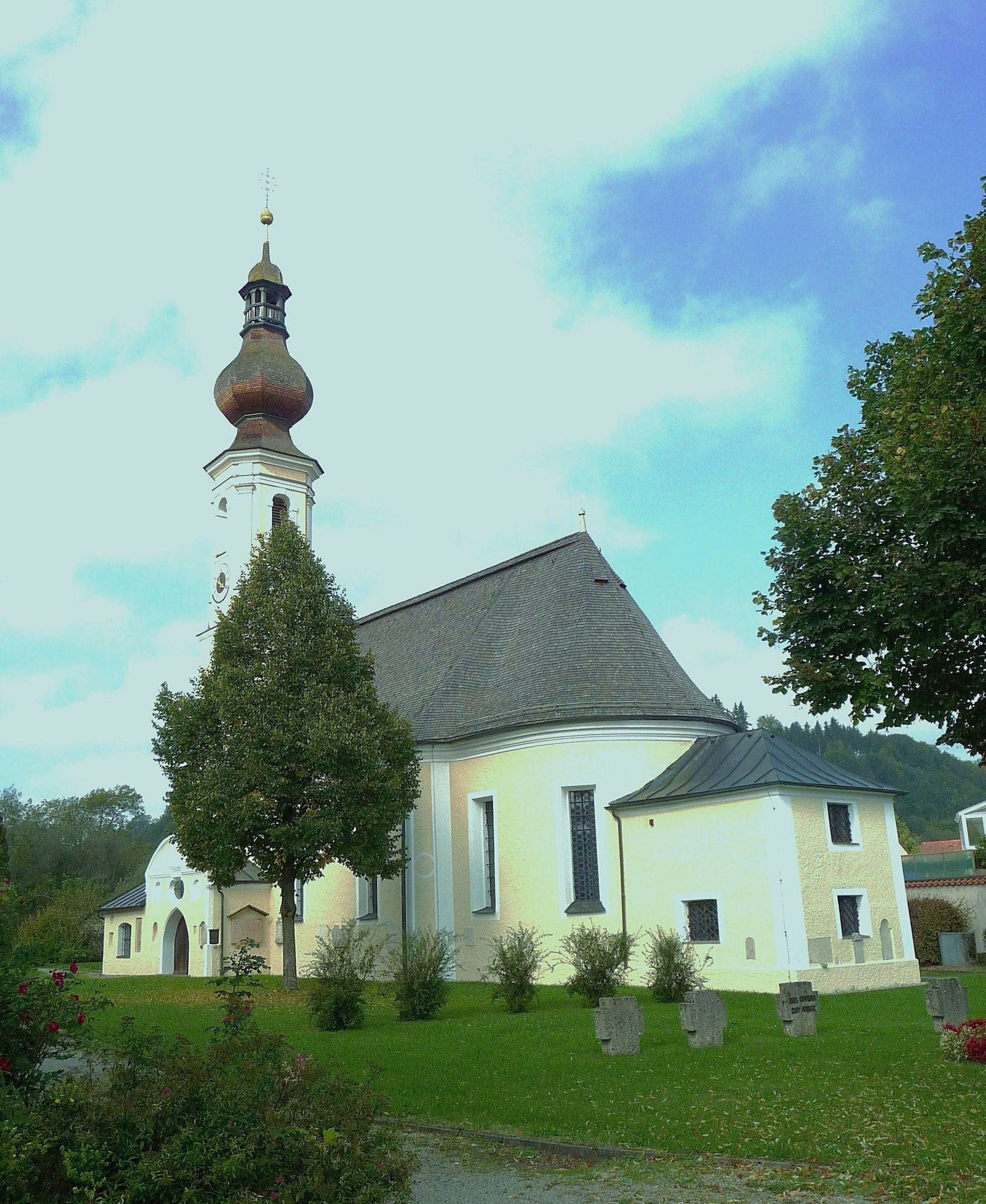 Die Kirche St. Ägigius in Altenmarkt an der Alz